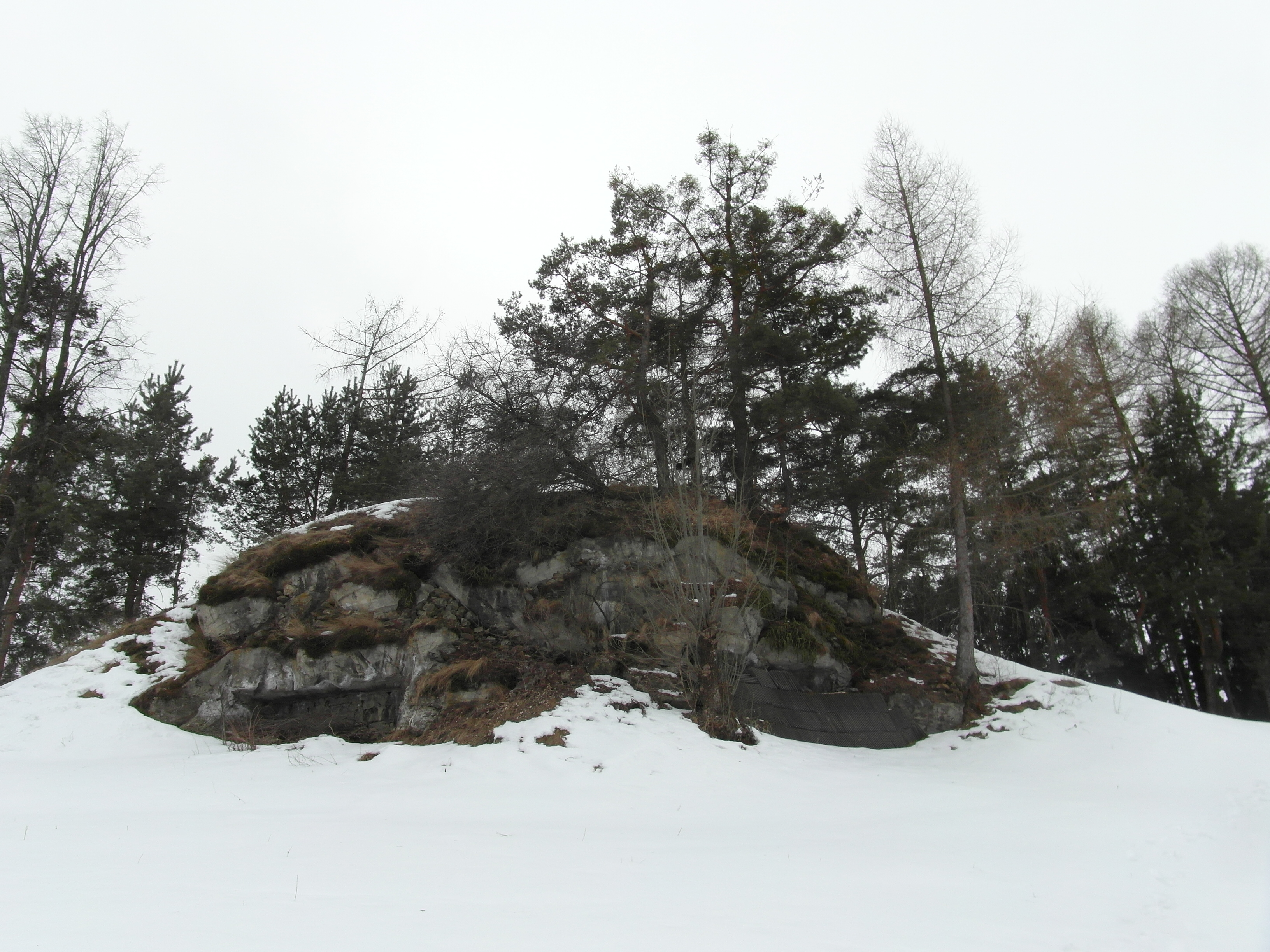 Opera 9 - Sbarramento Rienza-Rio Valles-Sciaves